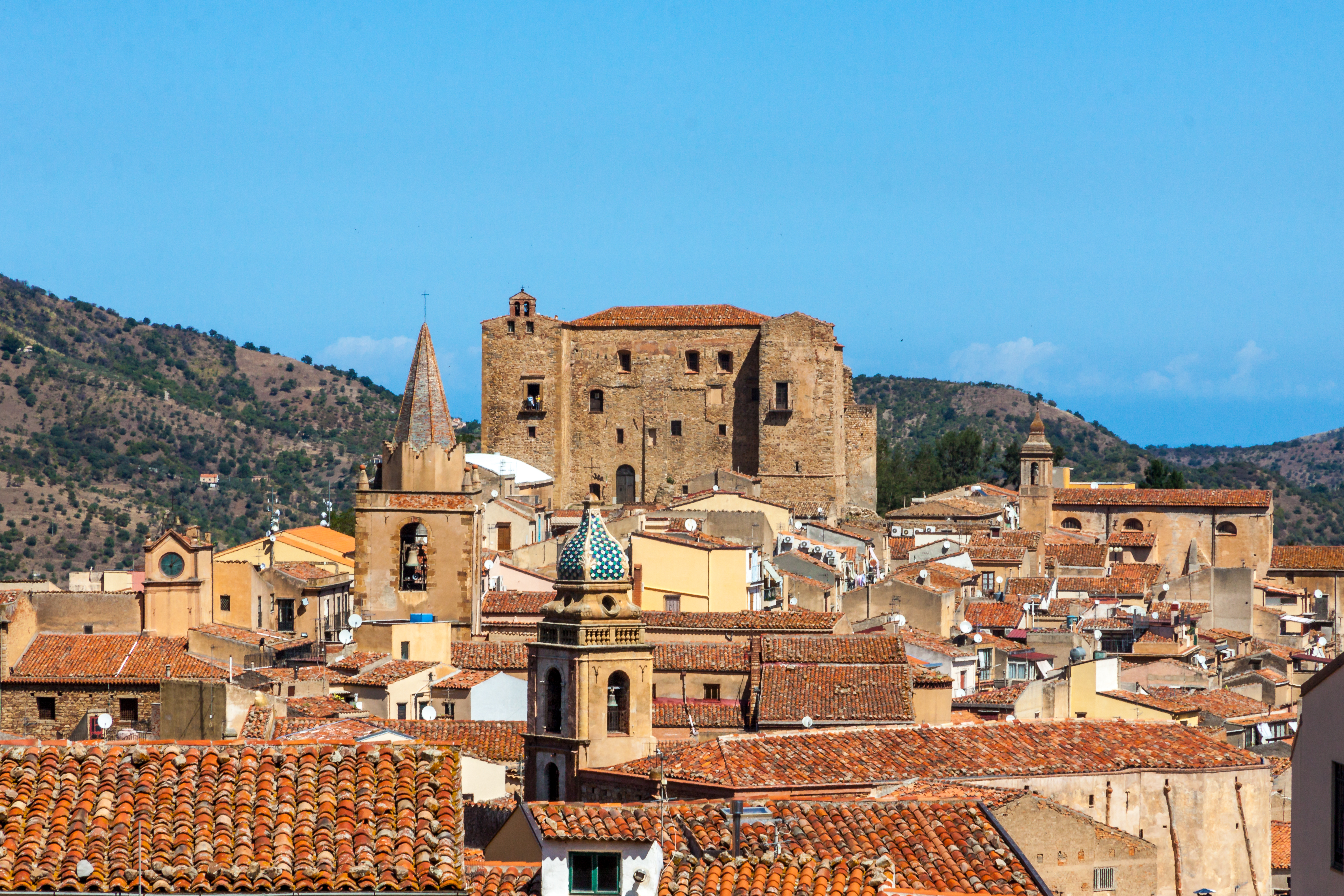 Castelbuono